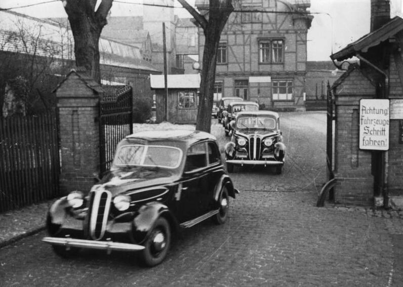 ADN-ZB/Archiv BMW-Werke Eisenach Die volkseigenen BMW-Werke Eisenach lieferten soeben die ersten 15 BMW-Personenkraftwagen an die DWK für den zivilen Bedarf.